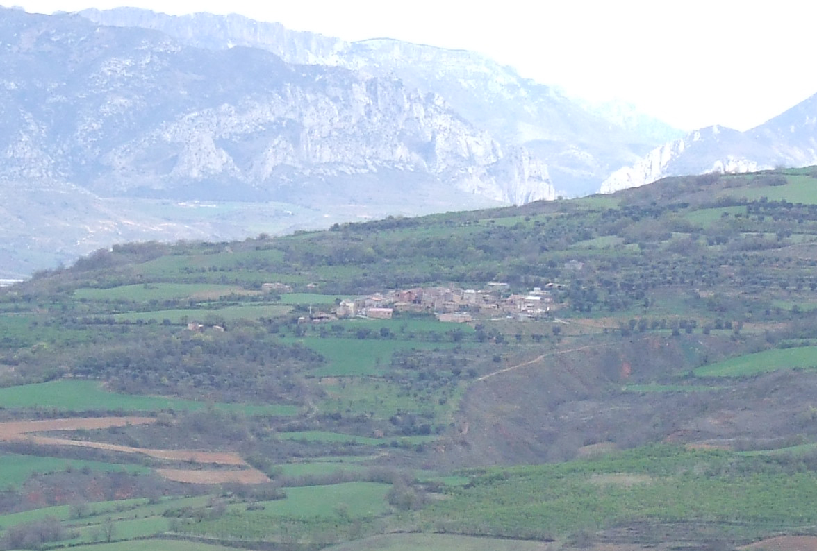 Sant Serni des d'Estorm.